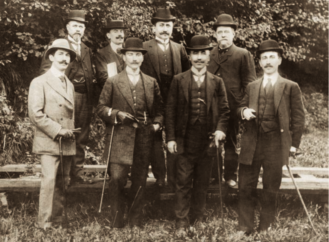 Mustafa Kemal (Atatürk), Picardie Manevraları’nda, Fransa, 28 Eylül 1910